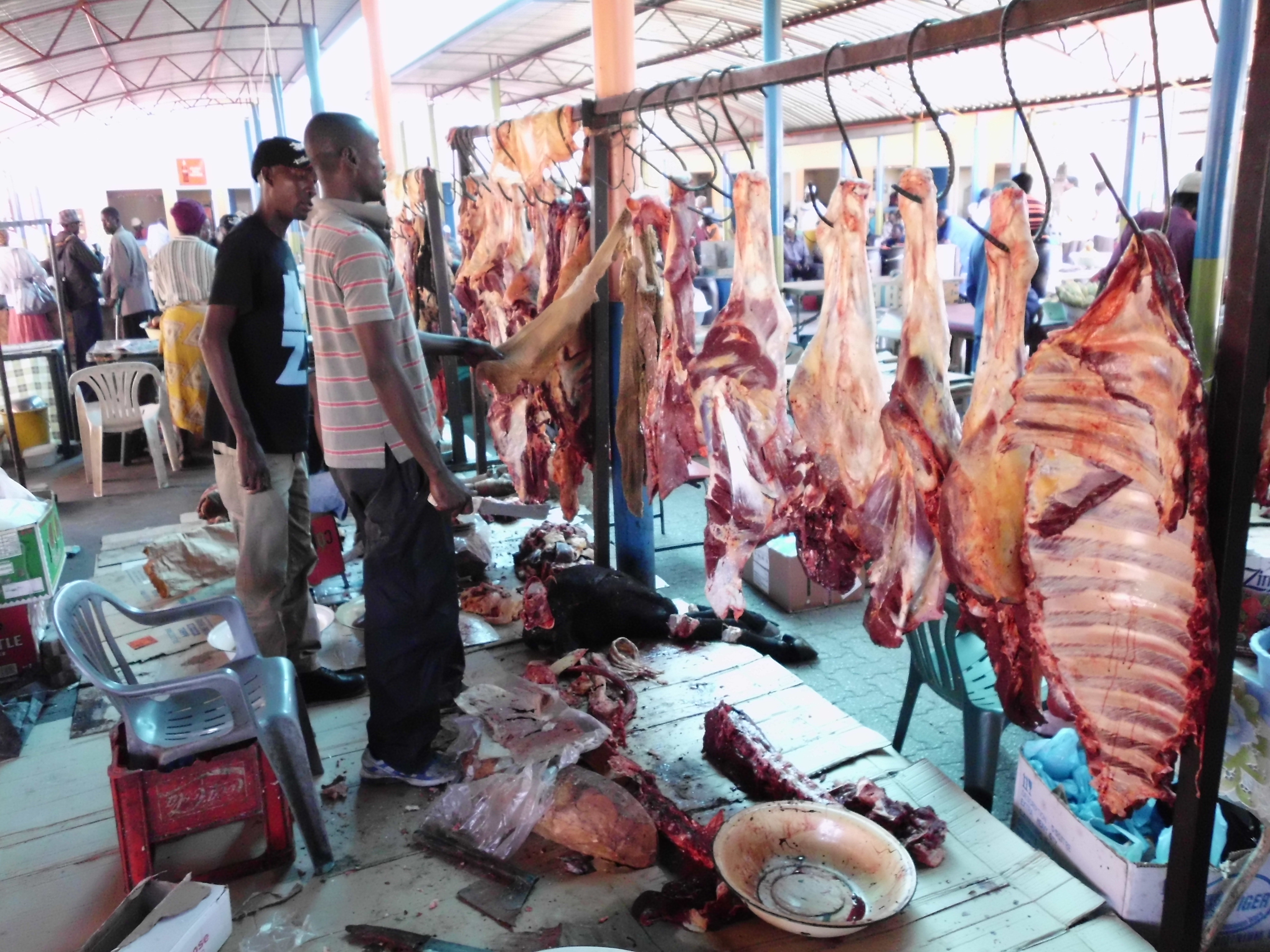 Fleischverkauf auf dem Outapi Open Market.